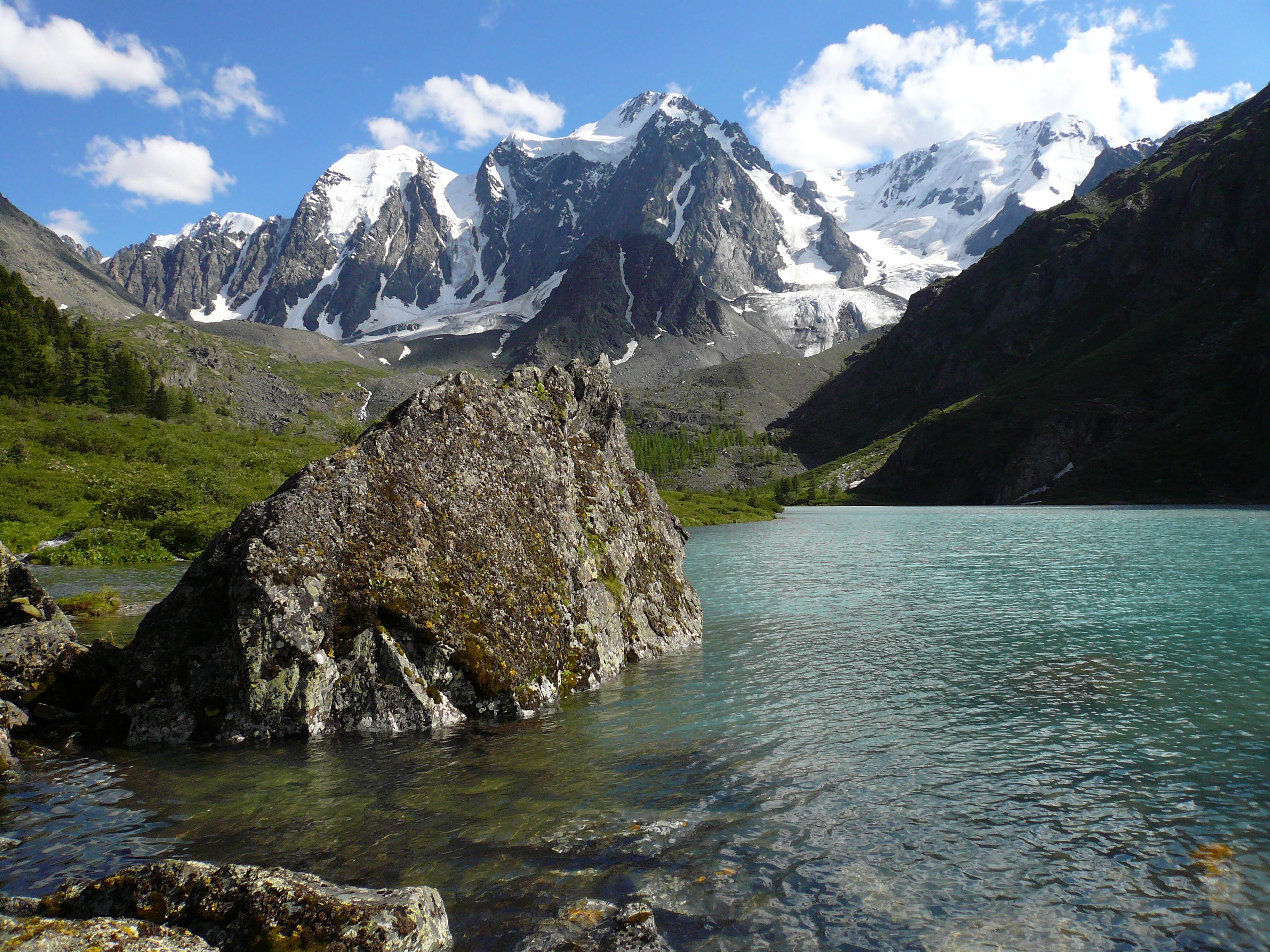 Вид на Верхнее Шавлинское озеро. Высота - около 2170 метров.